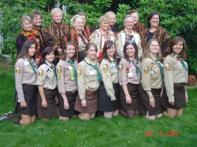 Велика Рада 2006